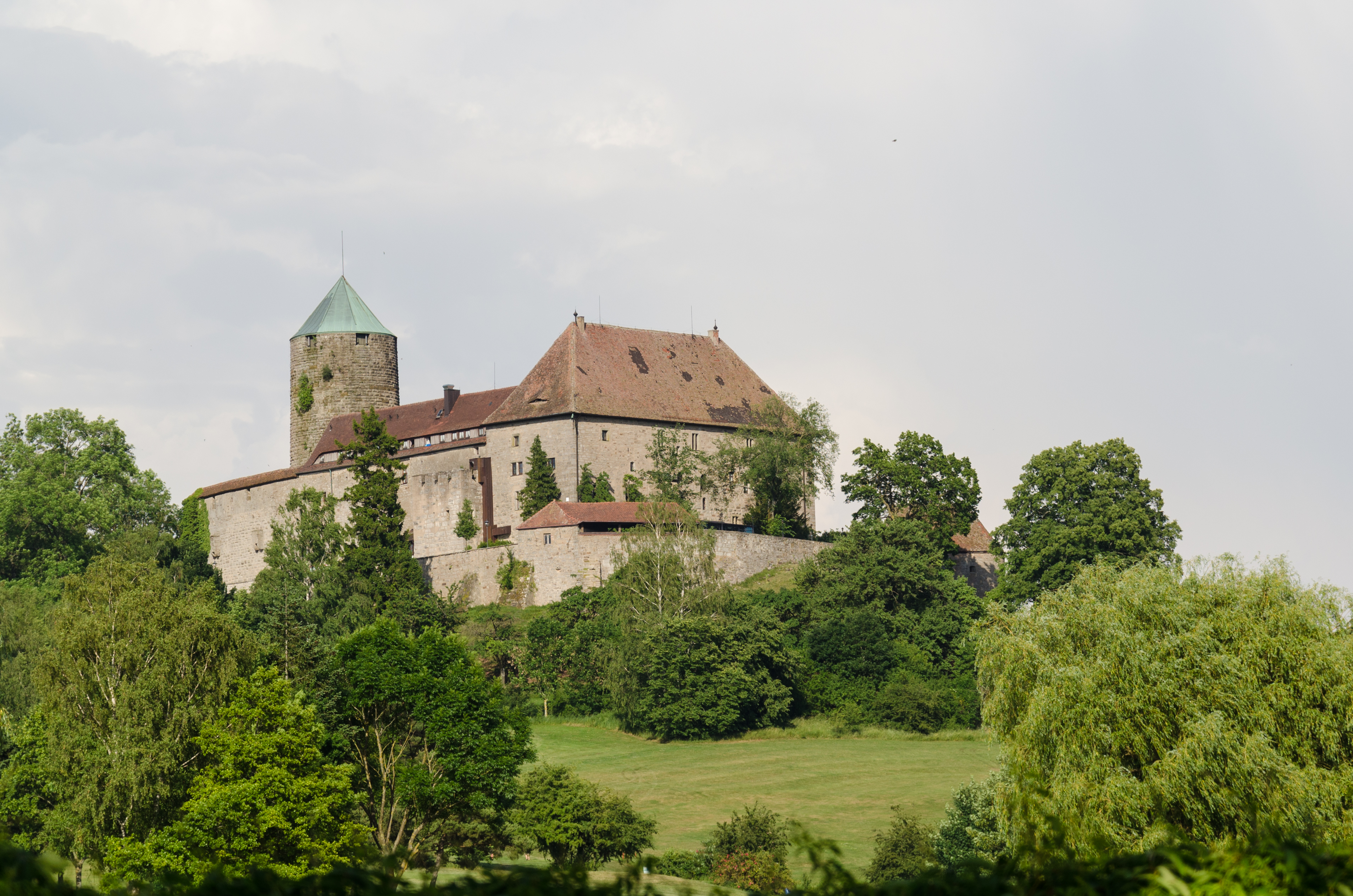 Colmberg, Schloß